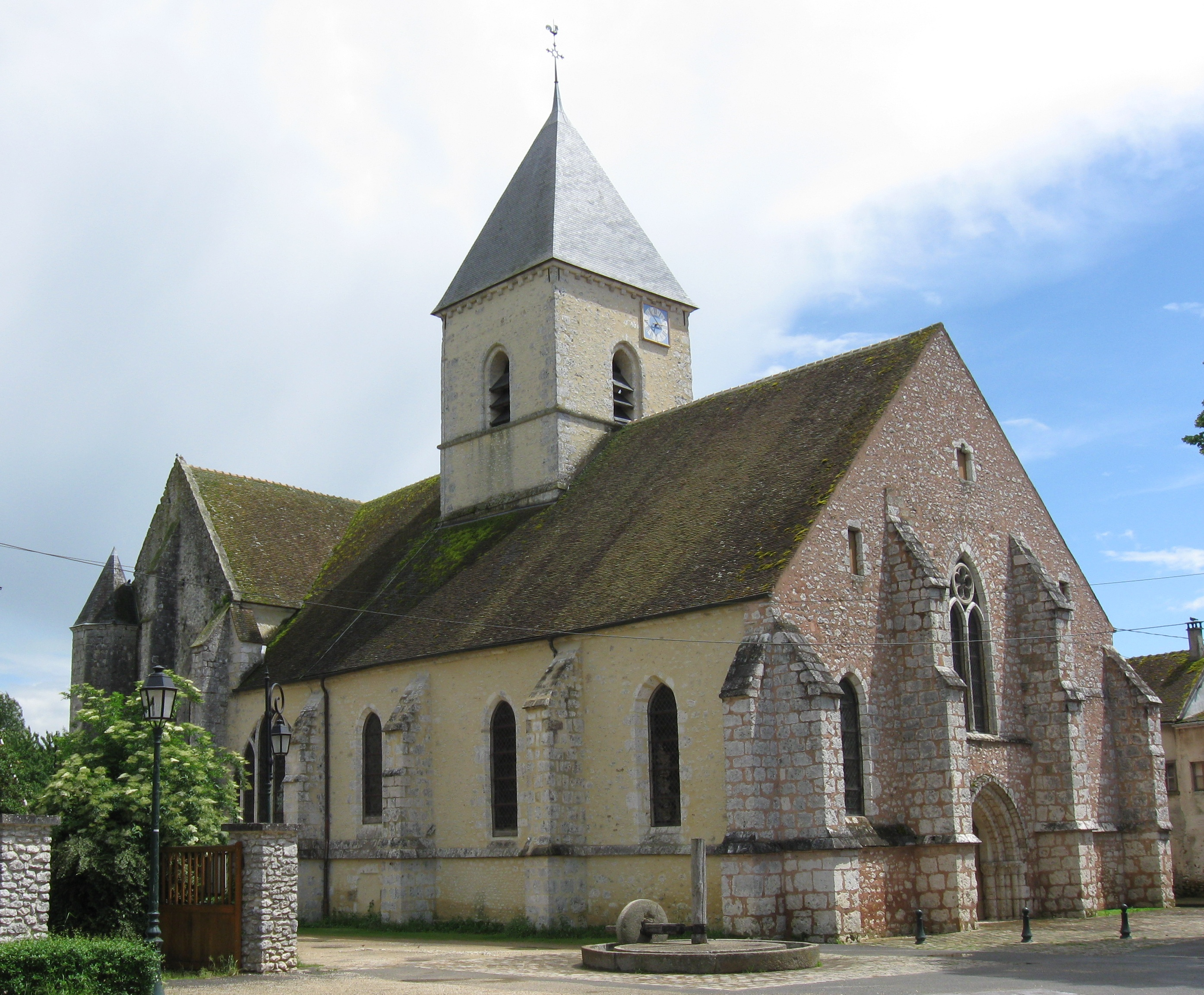 Église Saint-Denis de Beton-Bazoches. (Seine-et-Marne, région Île-de-France).